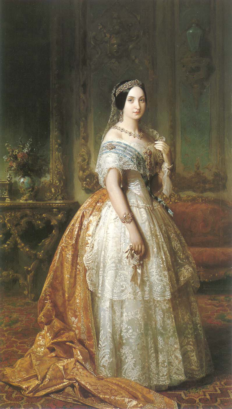 Retrato de la infanta Luisa Fernanda de Borbón (1832-1897), que fue hija del rey Fernando VII de España y hermana de la reina Isabel II.